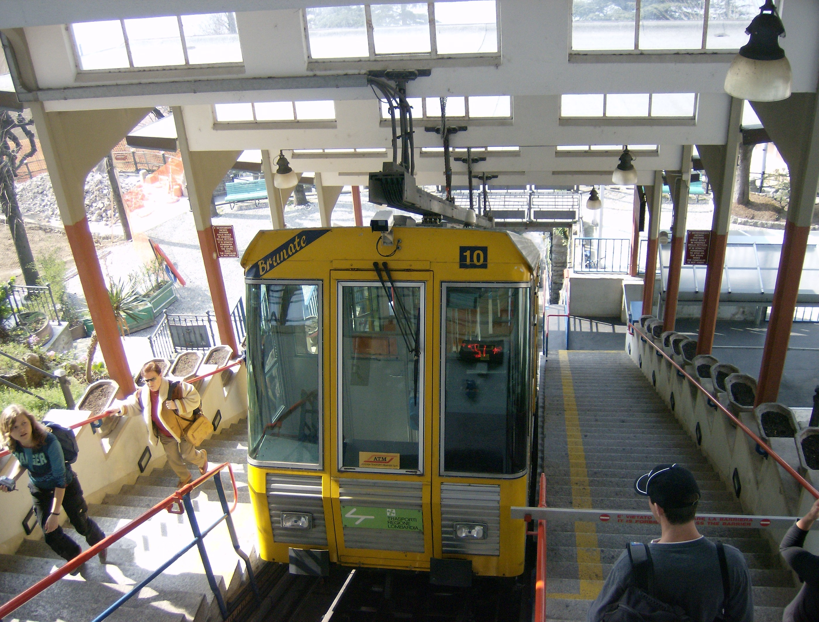 Funicolare Como-Brunate